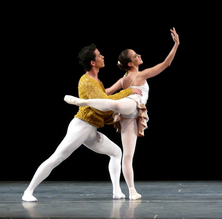 Taller Coreográfico de la UNAM - Temporada 2008